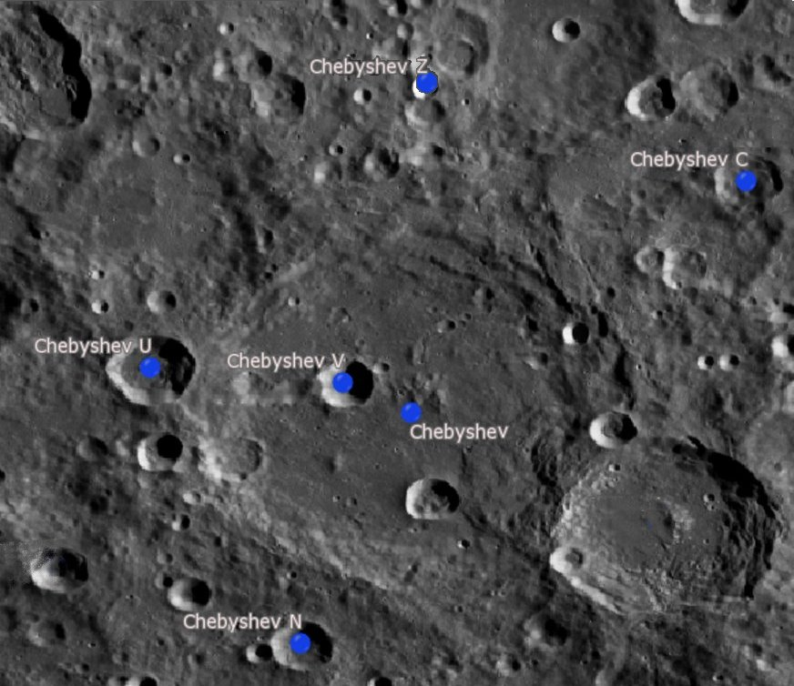 Cráter Chebyshev (LRO)